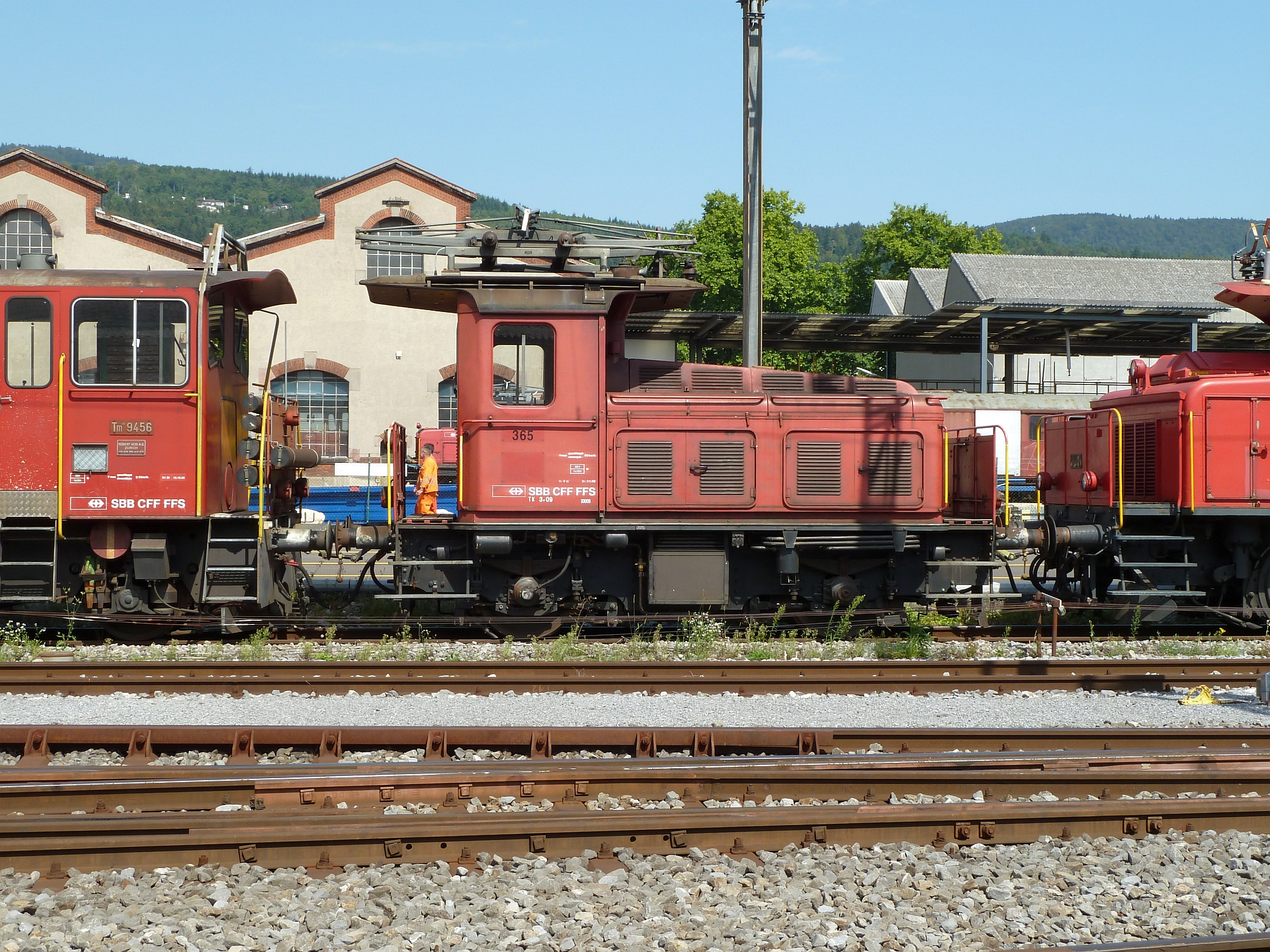 SBB Tem III 365, Biel/Bienne, 23.08.2011